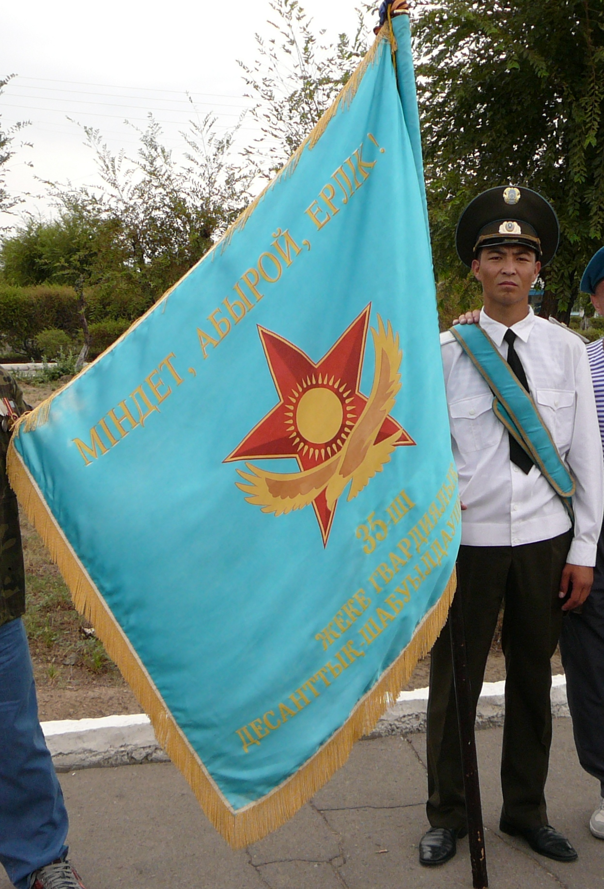 Боевое Знамя 35-й гвардейской отдельной десантно-штурмовой бригады